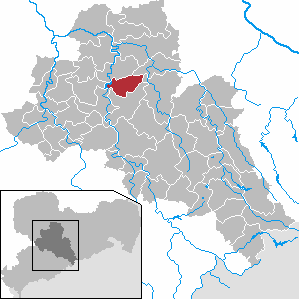 Kriebstein in Saxony - district Mittelsachsen